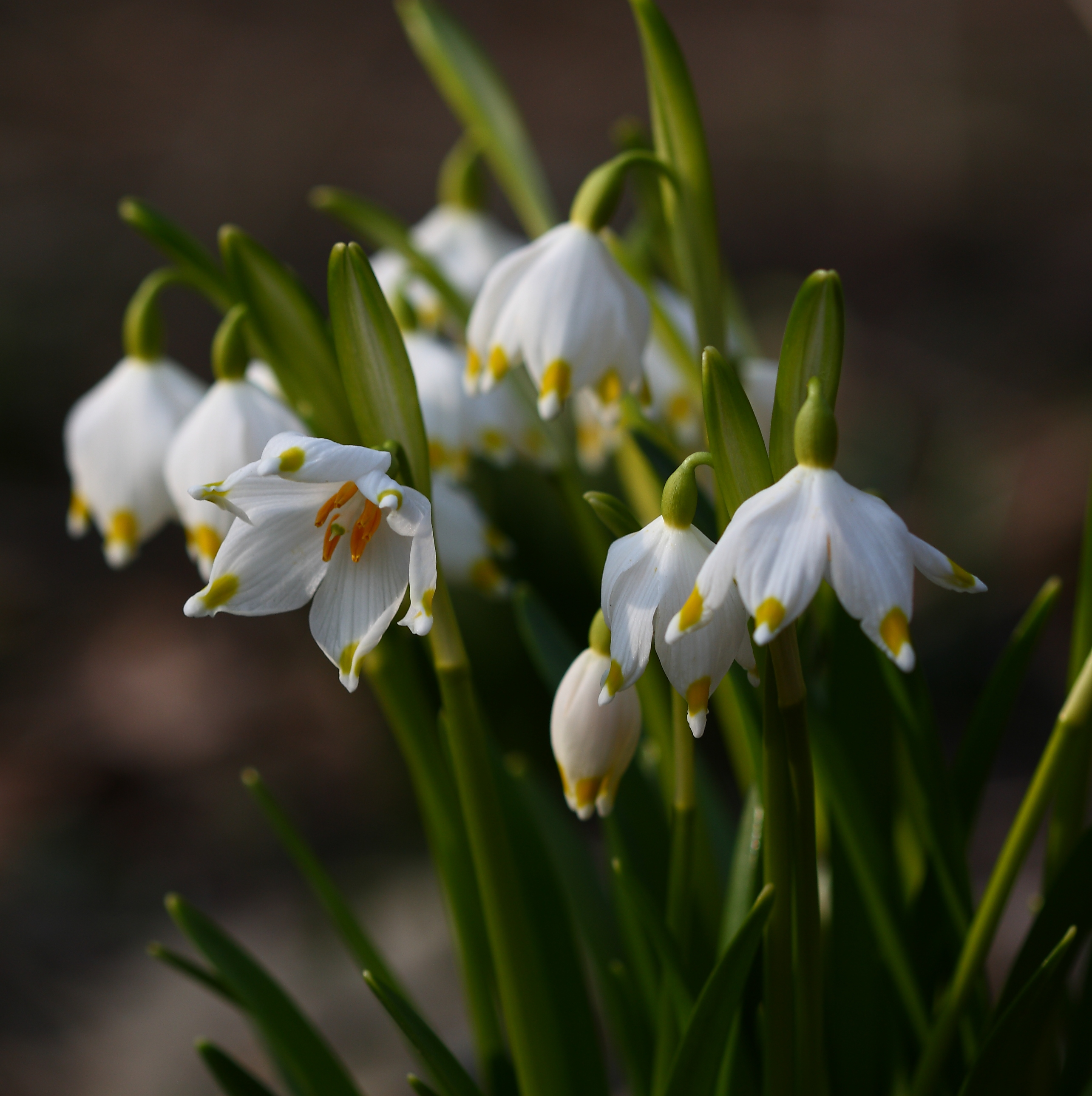 Märzenbecher